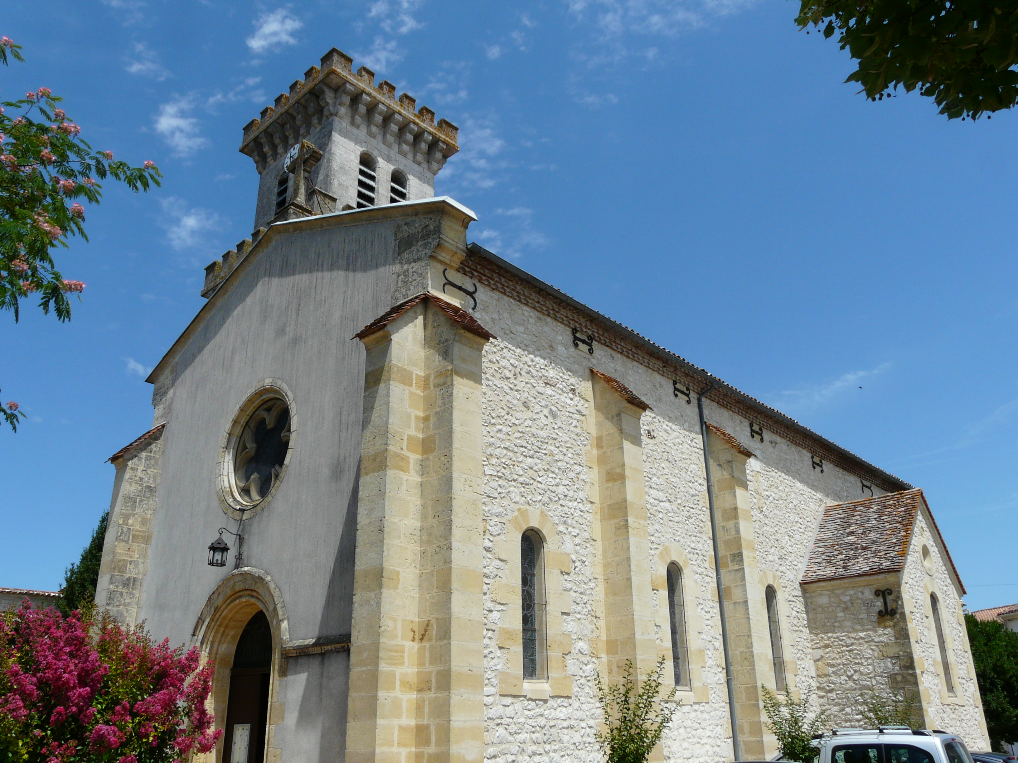 L'église Saint-Pierre-ès-Liens, Pomport, Dordogne, France.